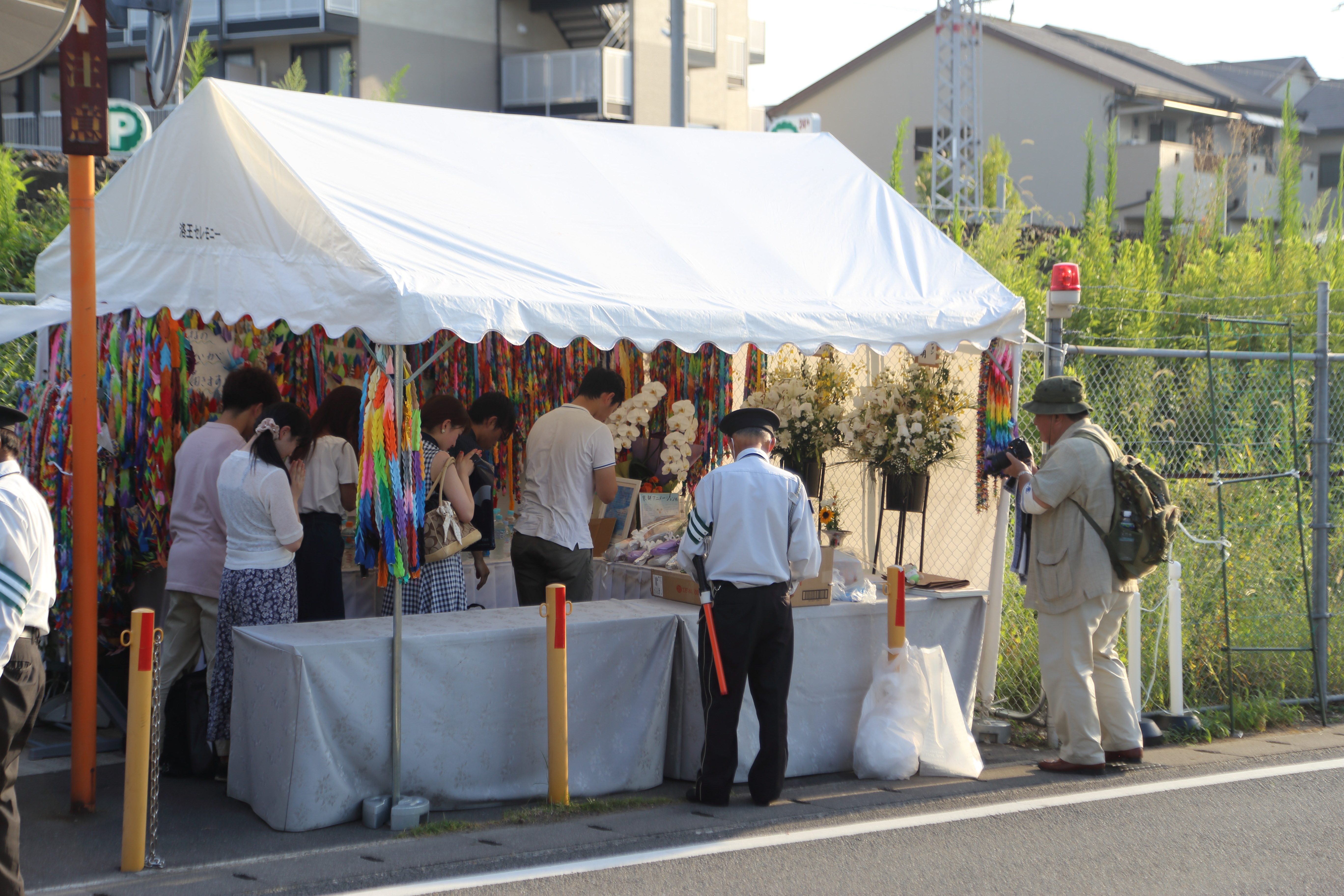 京阪六地蔵駅横に設置された京都アニメーション放火事件被害者を追悼する献花台。